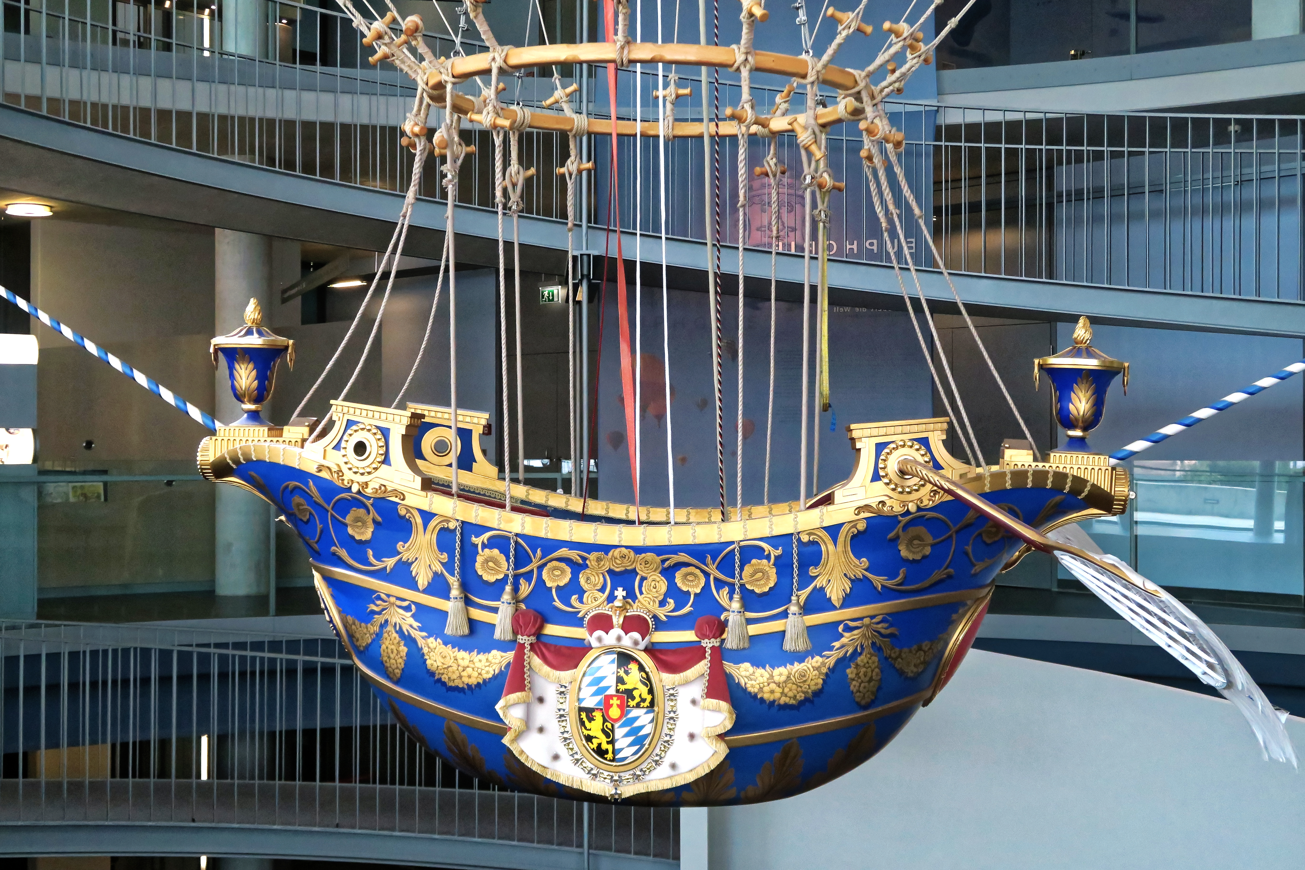 Szenen und Details des Ballonmuseums in Augsburg-Gersthofen